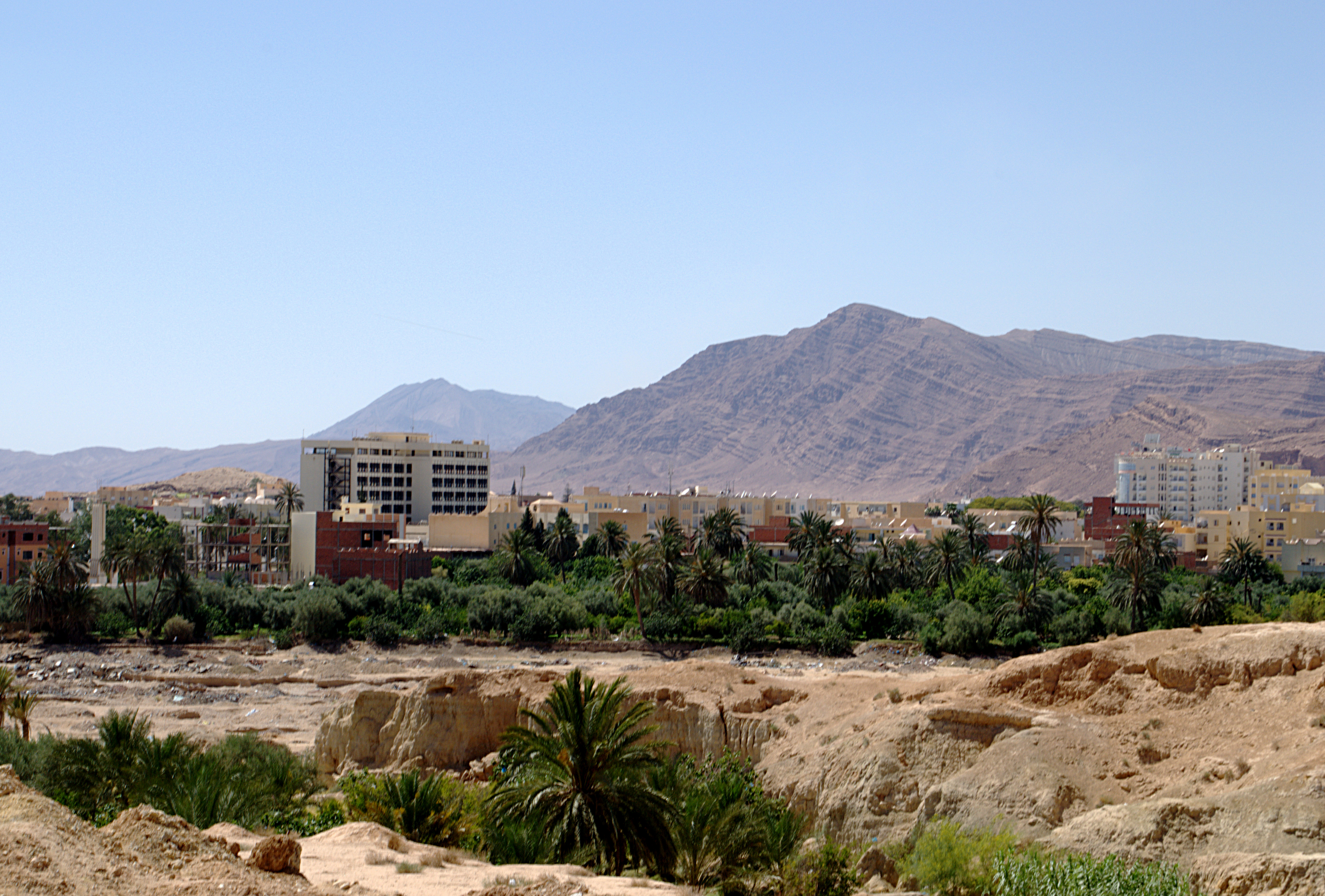 Vue de la ville de Gafsa depuis la route, la montagne de Bou Remli à l'arrière plan